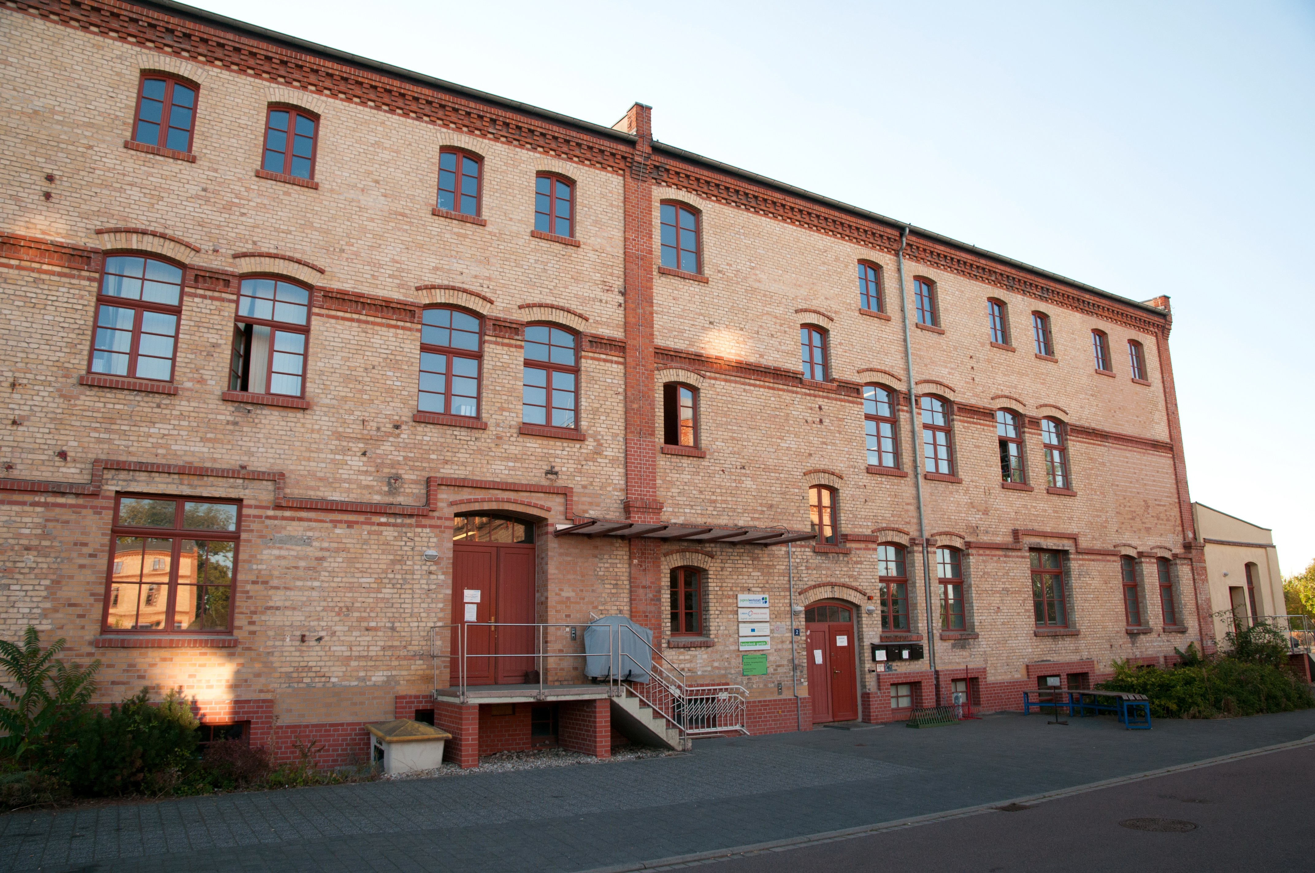 Gewerbehaus, ehemalige Kaffeefabrik, Heinrich-Franck-Straße 2 094 70149